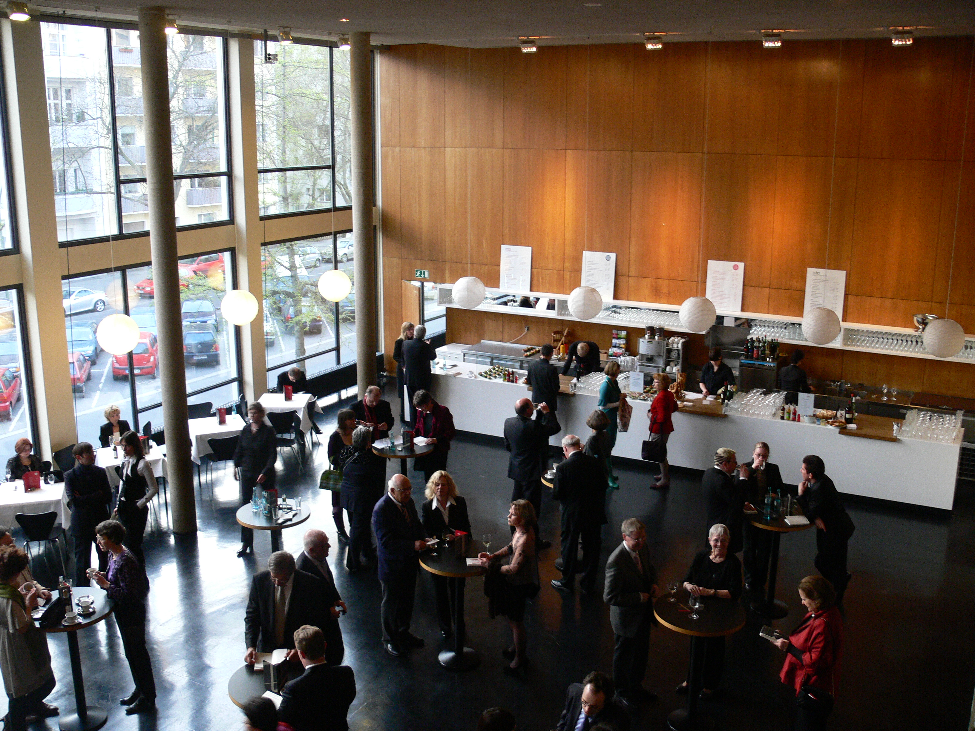 Berlin-Charlottenburg, Deutsche Oper Berlin, Foyer